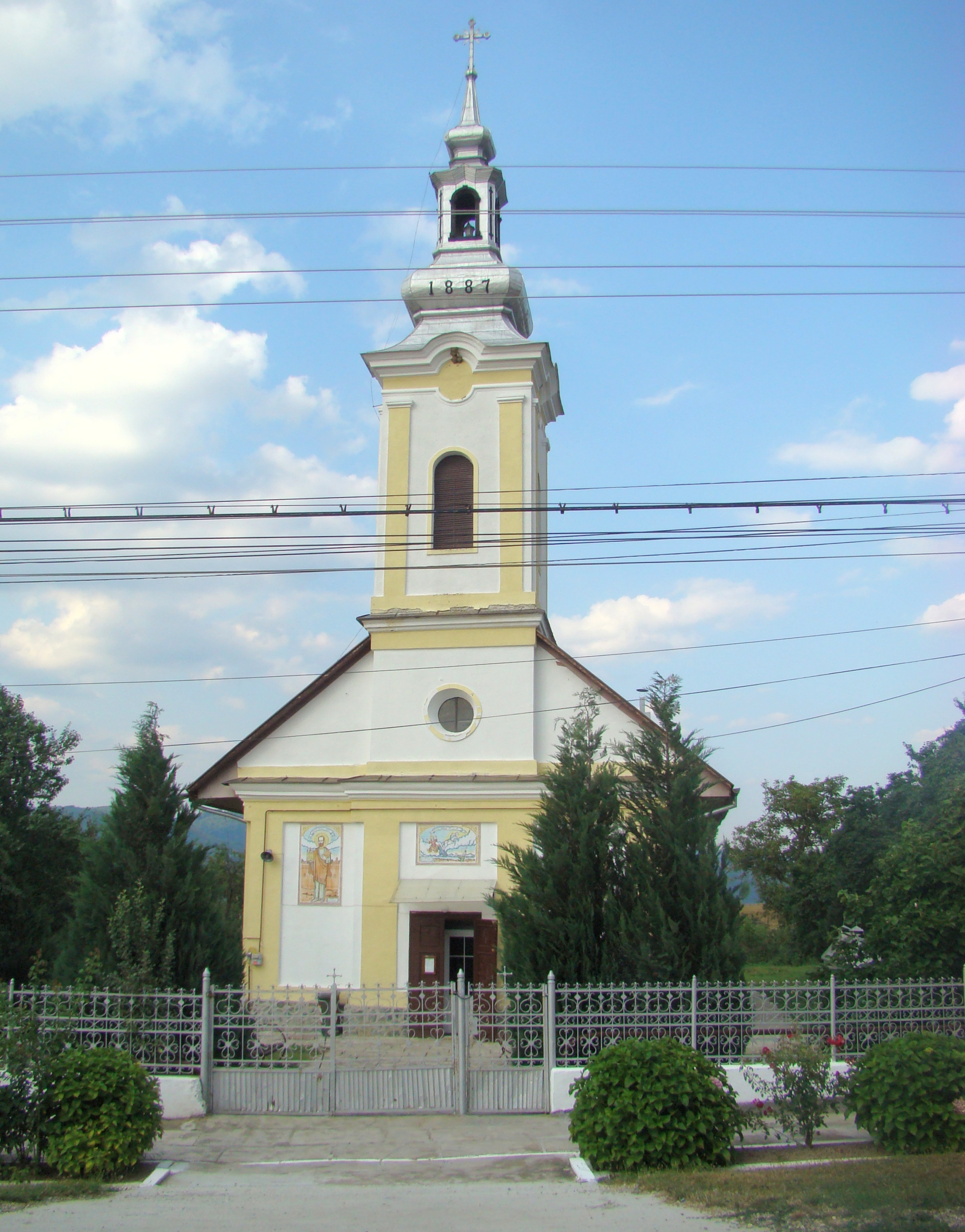 Biserica „Sf. Prooroc Ilie”, sat Marga; comuna Marga